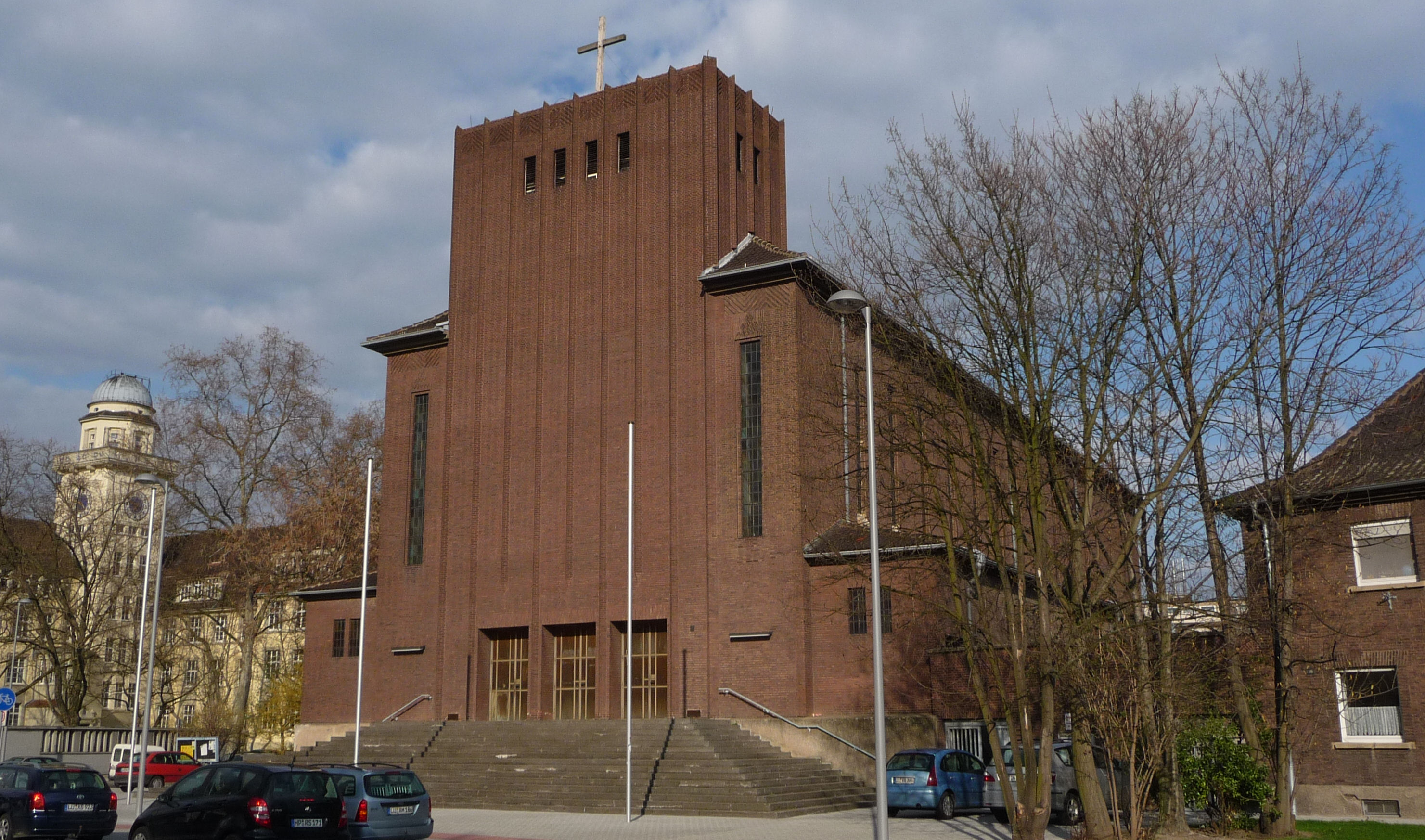 römisch-katholische Herz-Jesu-Kirche in Ludwigshafen am Rhein, Mundenheimer Straße 218; erbaut 1926-1929; unter Denkmalschutz